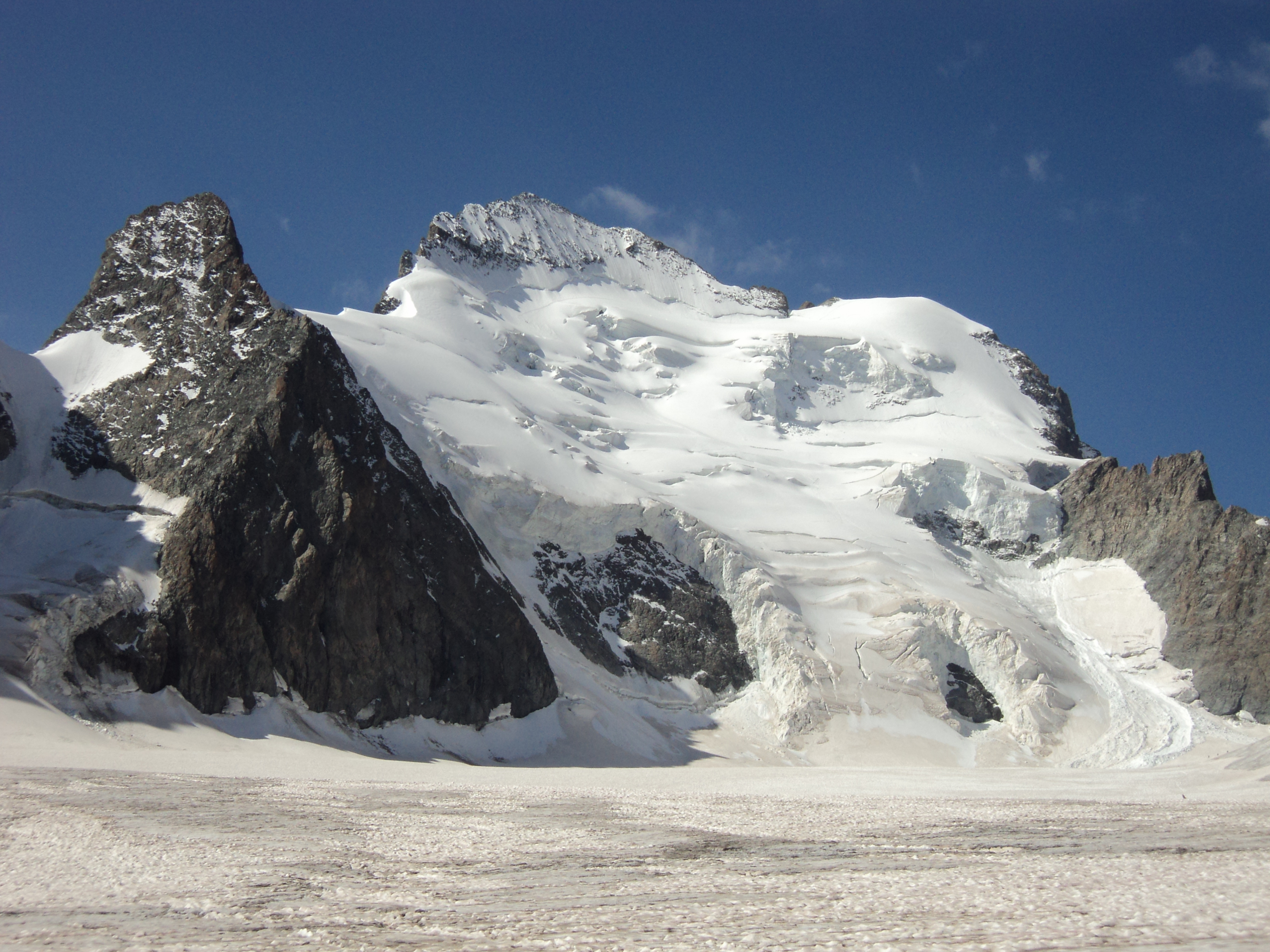 La Barre des Ecrins ed il Dome des Ecrins (a destra innevato) visti dal Glacier Blanc